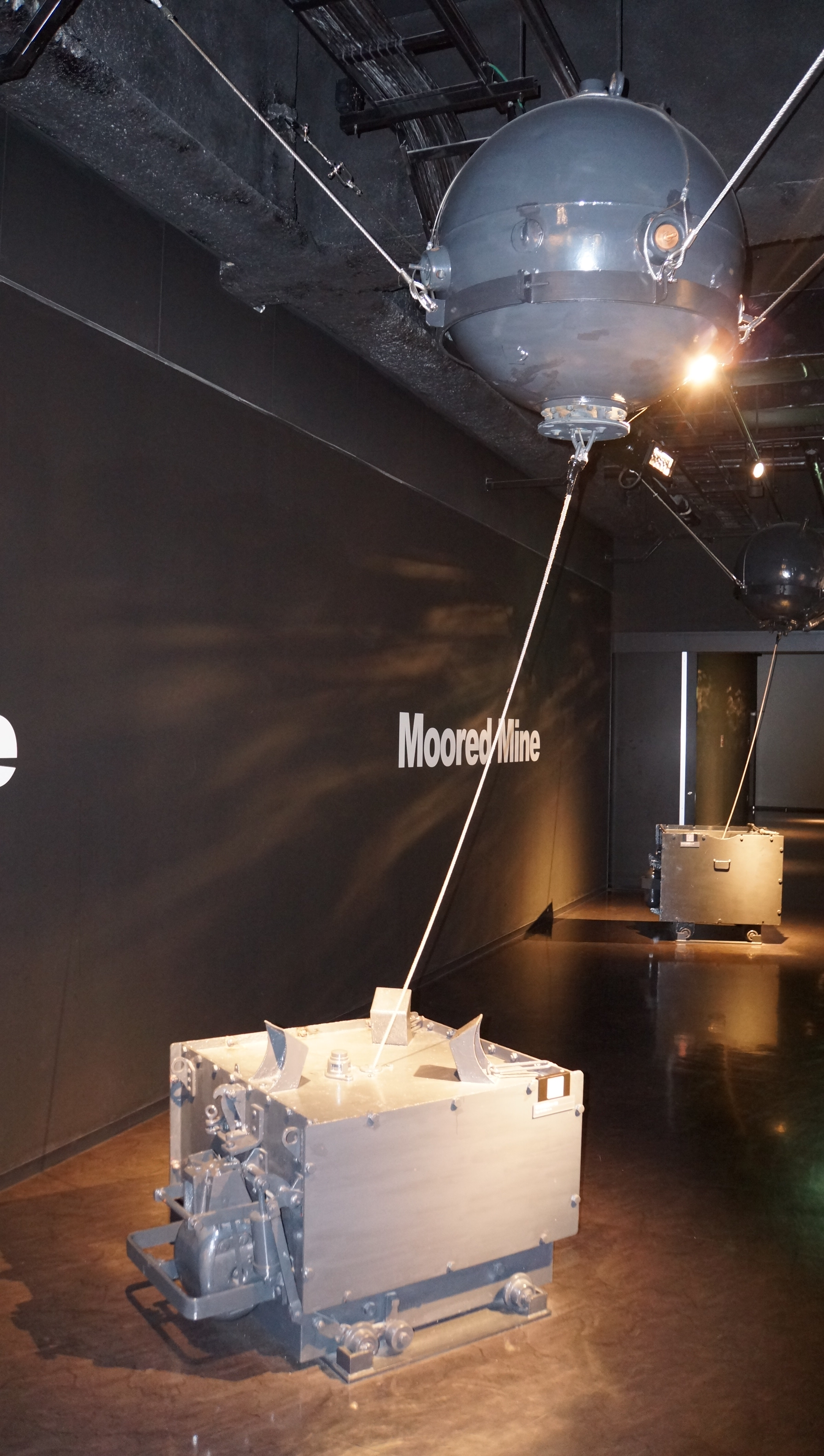 海上自衛隊 66式機雷（K-15）。 14年9月15日 海上自衛隊呉史料館内にて。